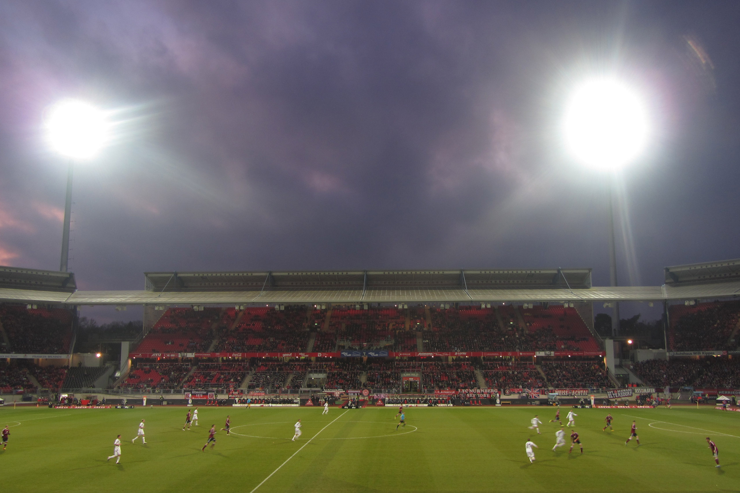 Club - Lautern 26. November 2011 easycredit-Stadion, Nürnberg, Deutschland